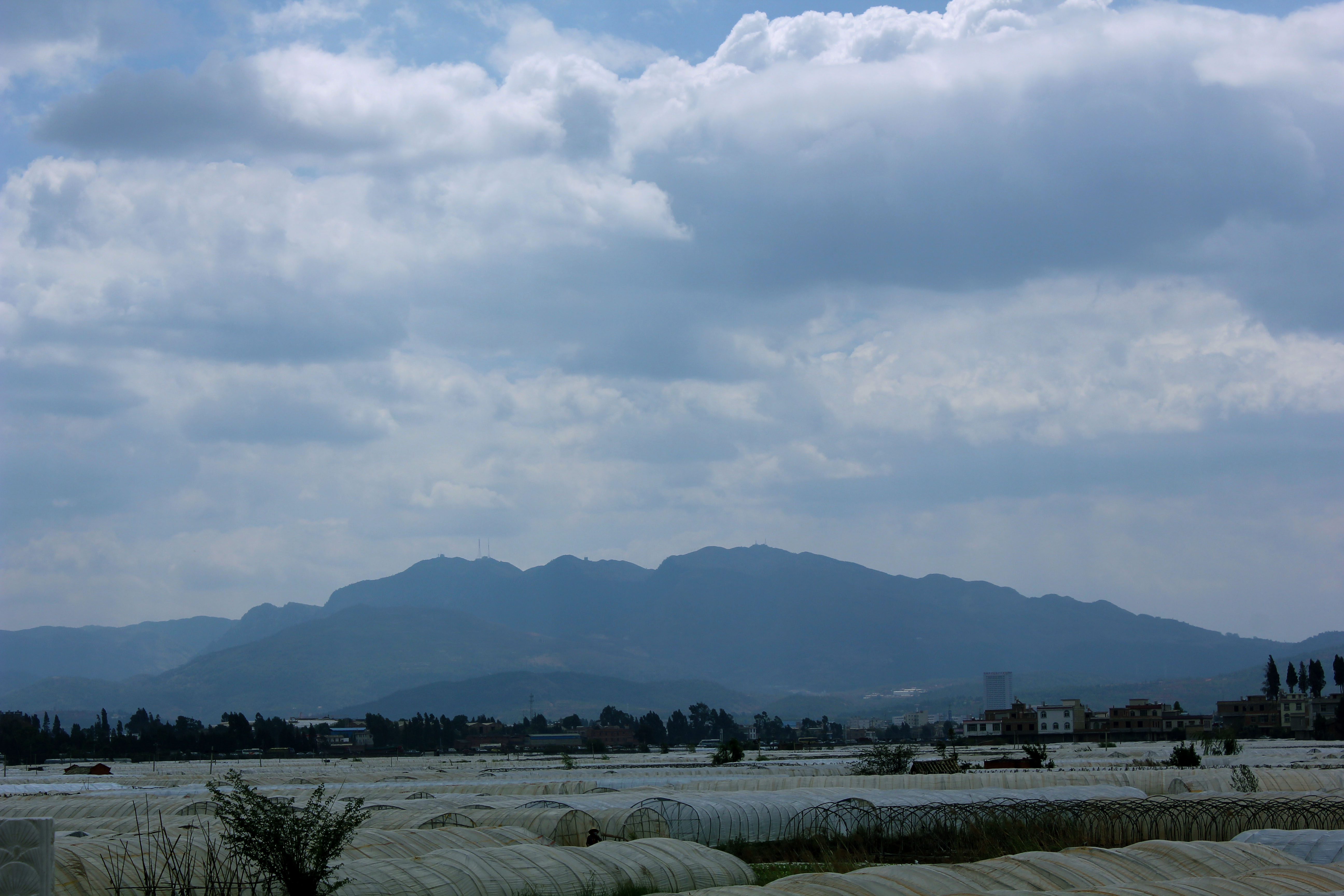 位于云南省昆明市呈贡区与澄江县交界处的梁王山，摄于呈贡南部梁王桥上。